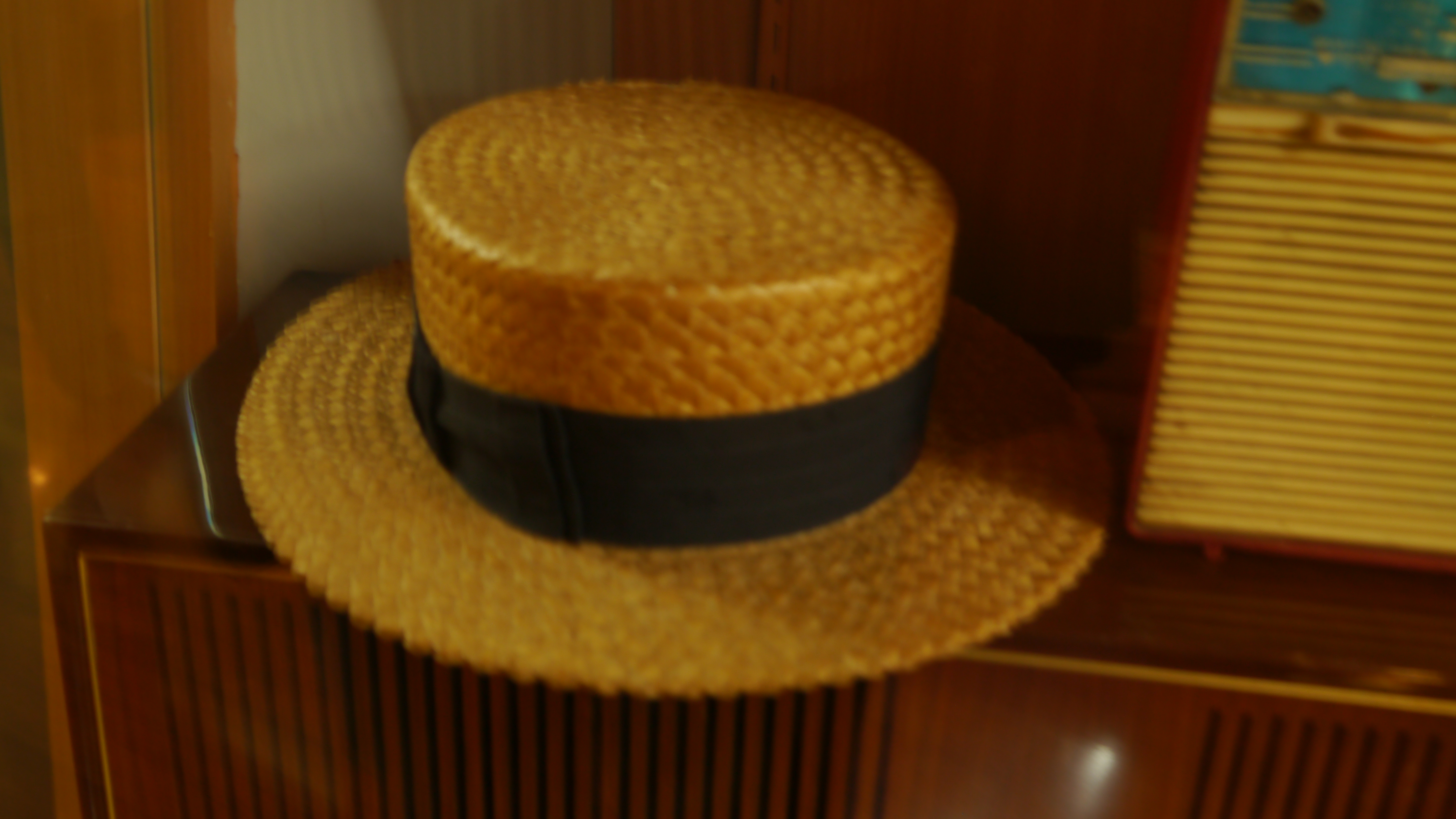 Sombrero típico ecuatoriano montubio, "Tostada"